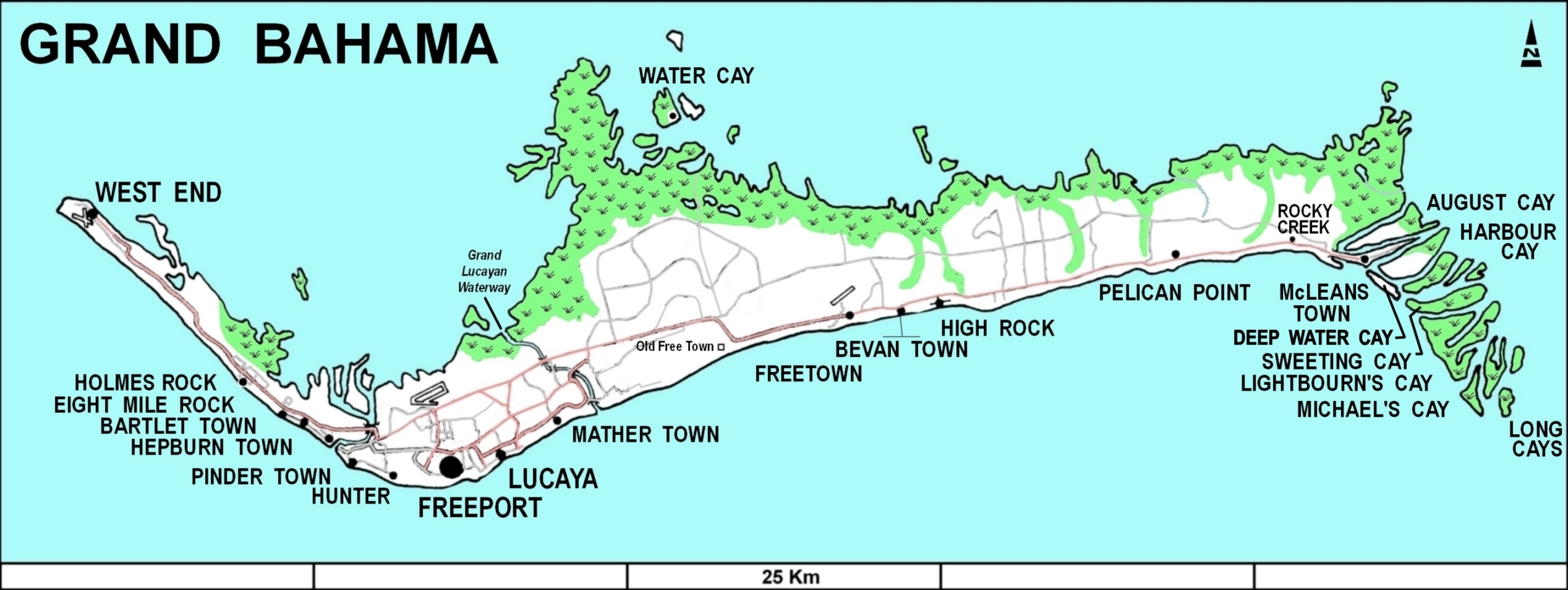 Karte von Grand Bahama